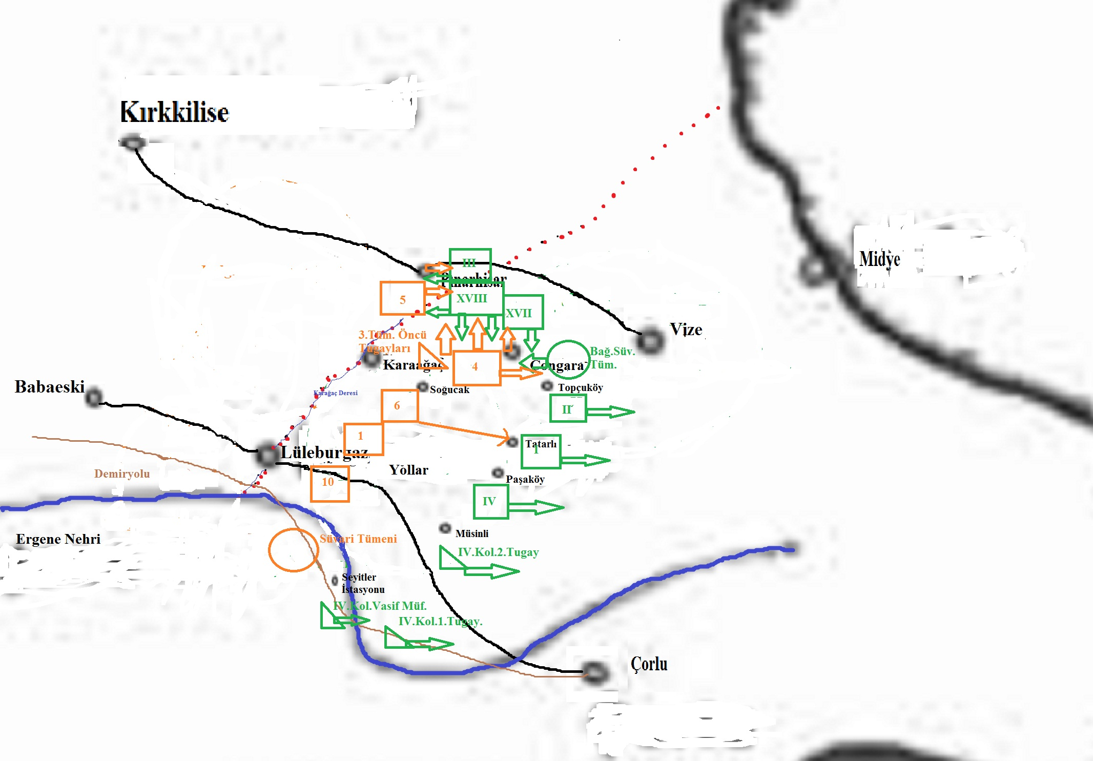 1 Kasım 1912 Luleburgaz